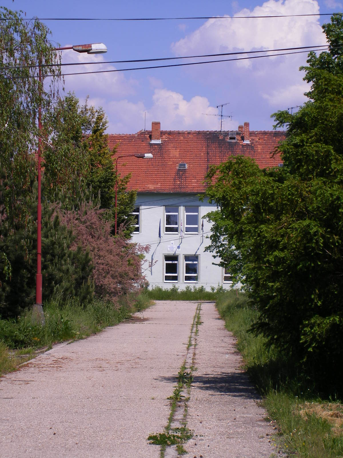 Komárom/Gadóc - volt mezgazdasági szakközépiskola